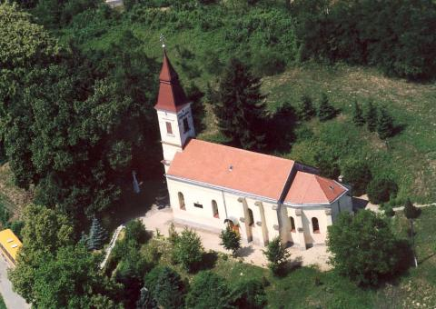 Dióskál, Hungary, aerial photography. Szent István király római katolikus templom